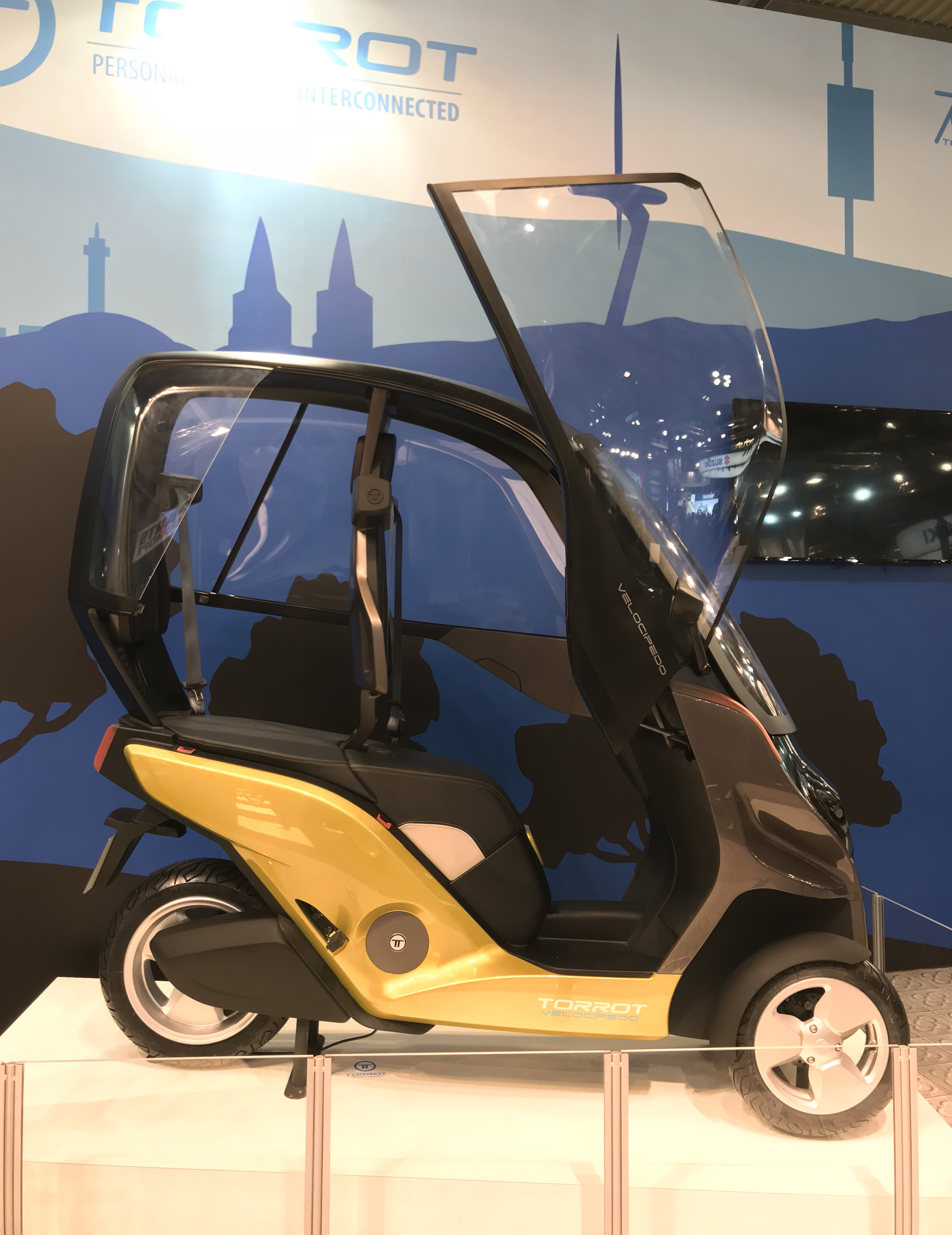 Velocípedo eléctrico de tres ruedas sXXI fabricado por la compañía española Torrot